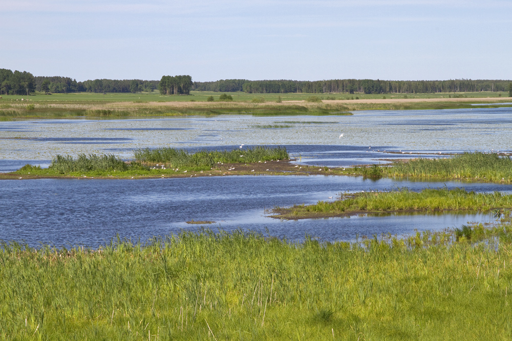 Den fågelrika Vendelsjön i Uppland.